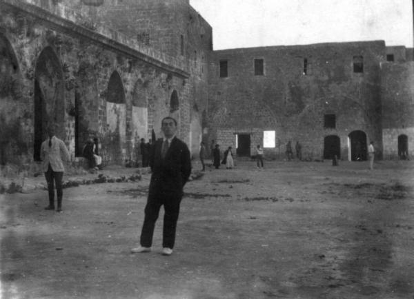 זאב ז'בוטינסקי בחצר כלא עכו.